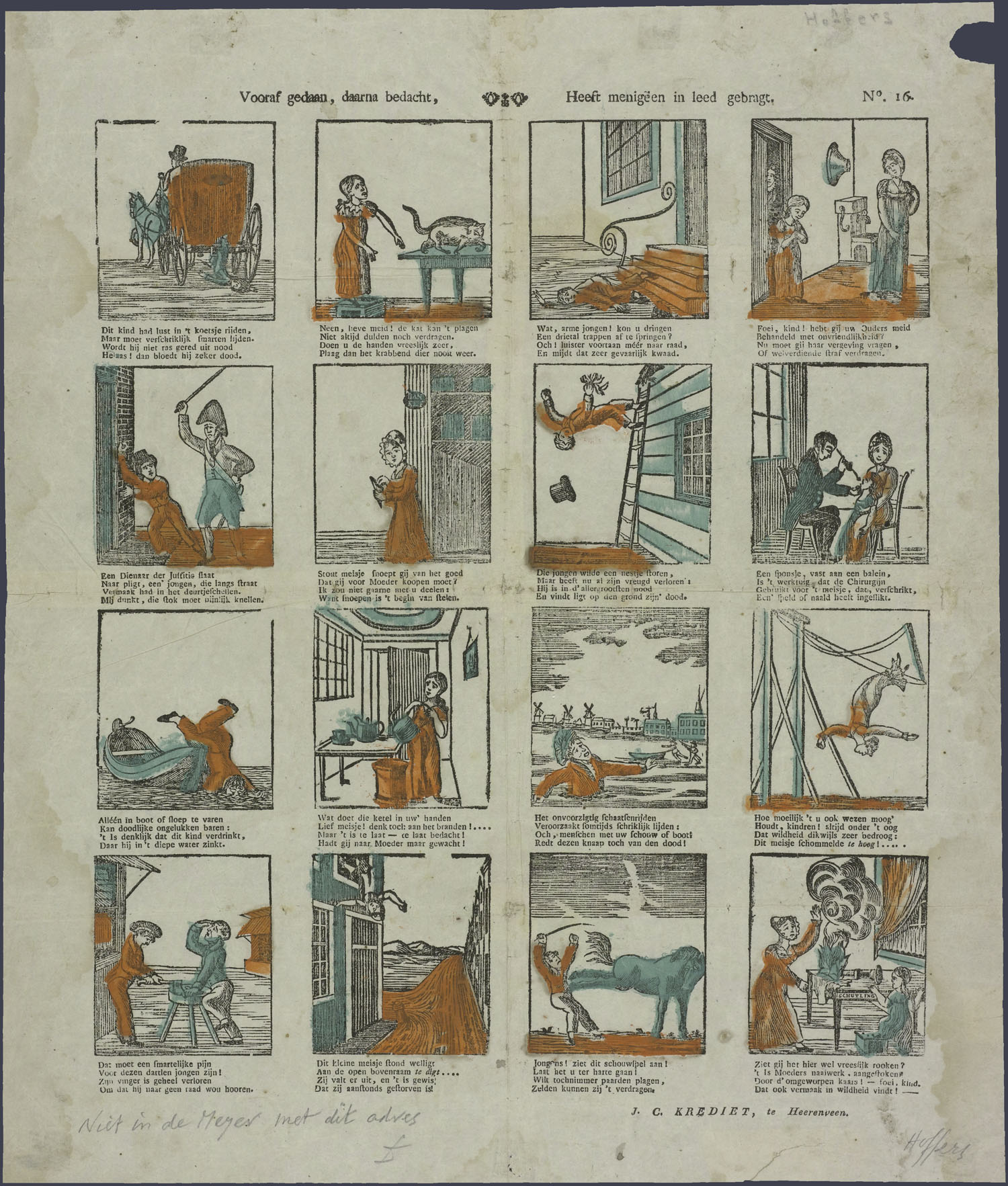 Centsprent met 4 x 4 omkaderde houtsneden, met afbeeldingen van onvoorzichtige kinderen die ongelukken krijgen. Ze vallen van een koets, een trap, een ladder, een schommel en uit een raam, een wordt door de kat gekrabt, een moet vergeving vragen aan de meid, een krijgt slaag na belletje trekken, een heeft een naald ingeslikt, een verdrinkt, een brandt zich, een zakt door het ijs, een vinger wordt afgehakt, een krijgt een trap van een paard en een veroorzaakt brand. Met vierregelige rijmende onderschriften.